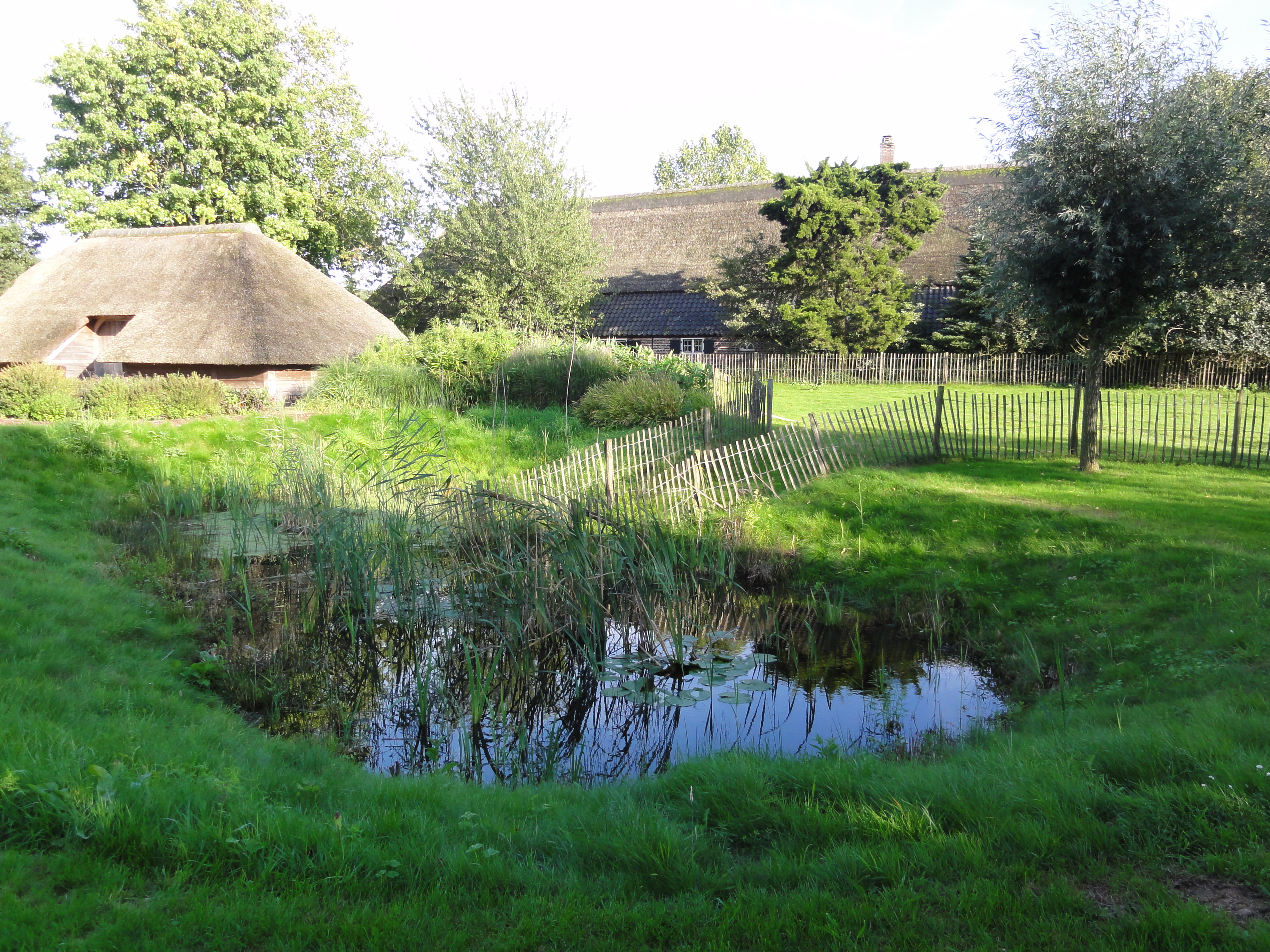 Alverna (Wijchen) Rijksmonument 39638 boerderij Graafseweg 370